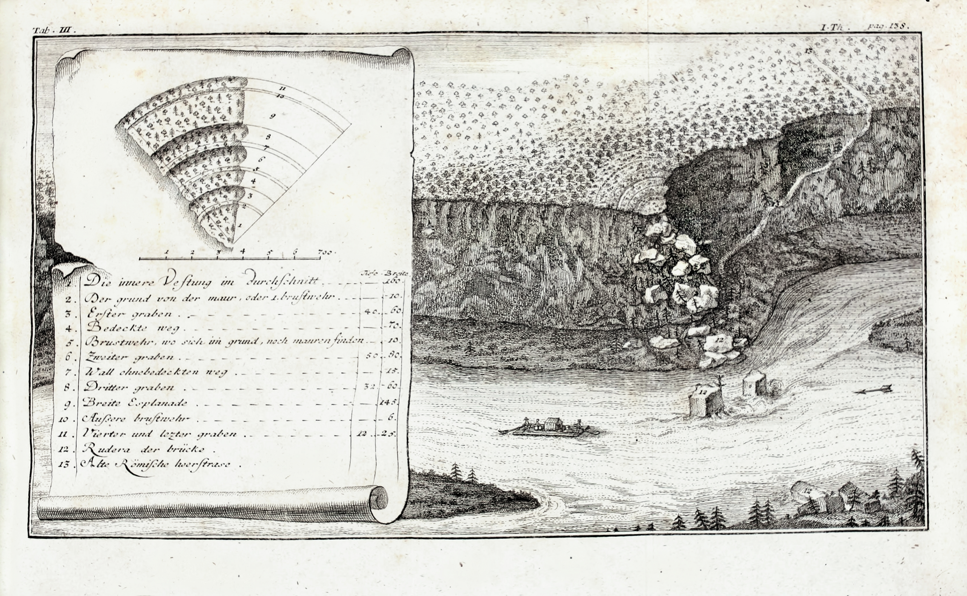 Isar gegenüber Baierbrunn mit Römerschanze und Georgenstein